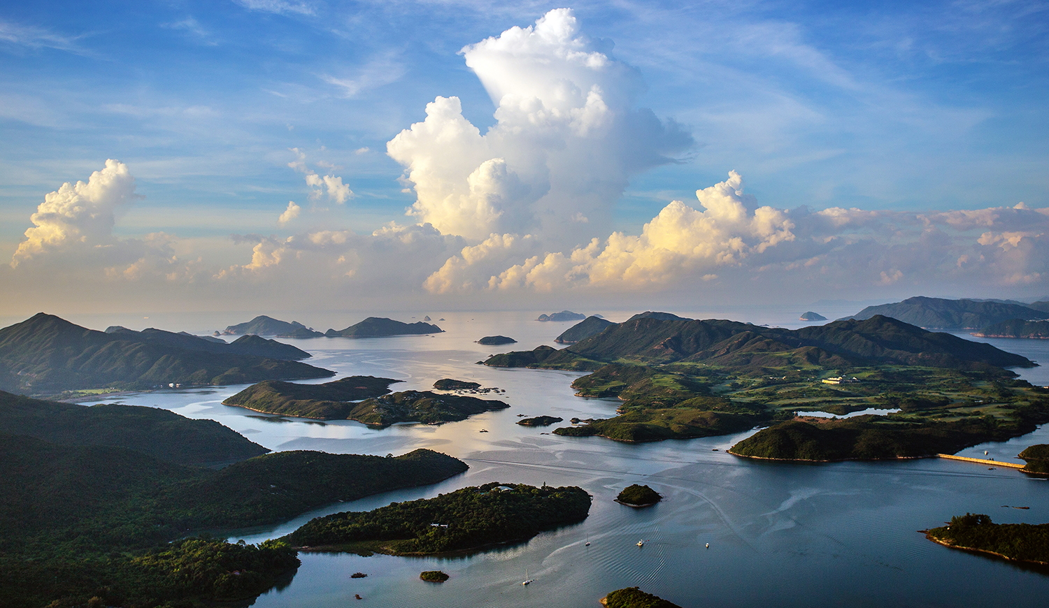 Sai Kung Hoi